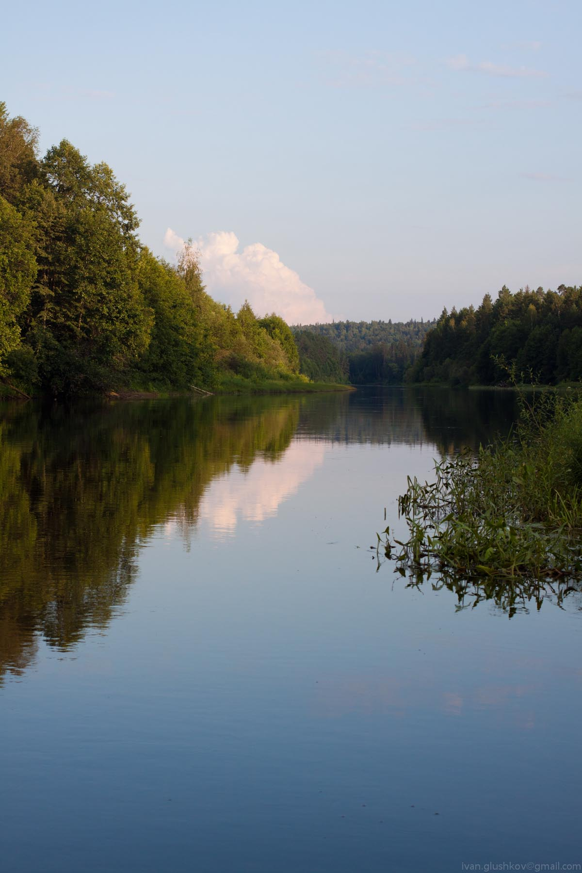 река Большой Кокшага